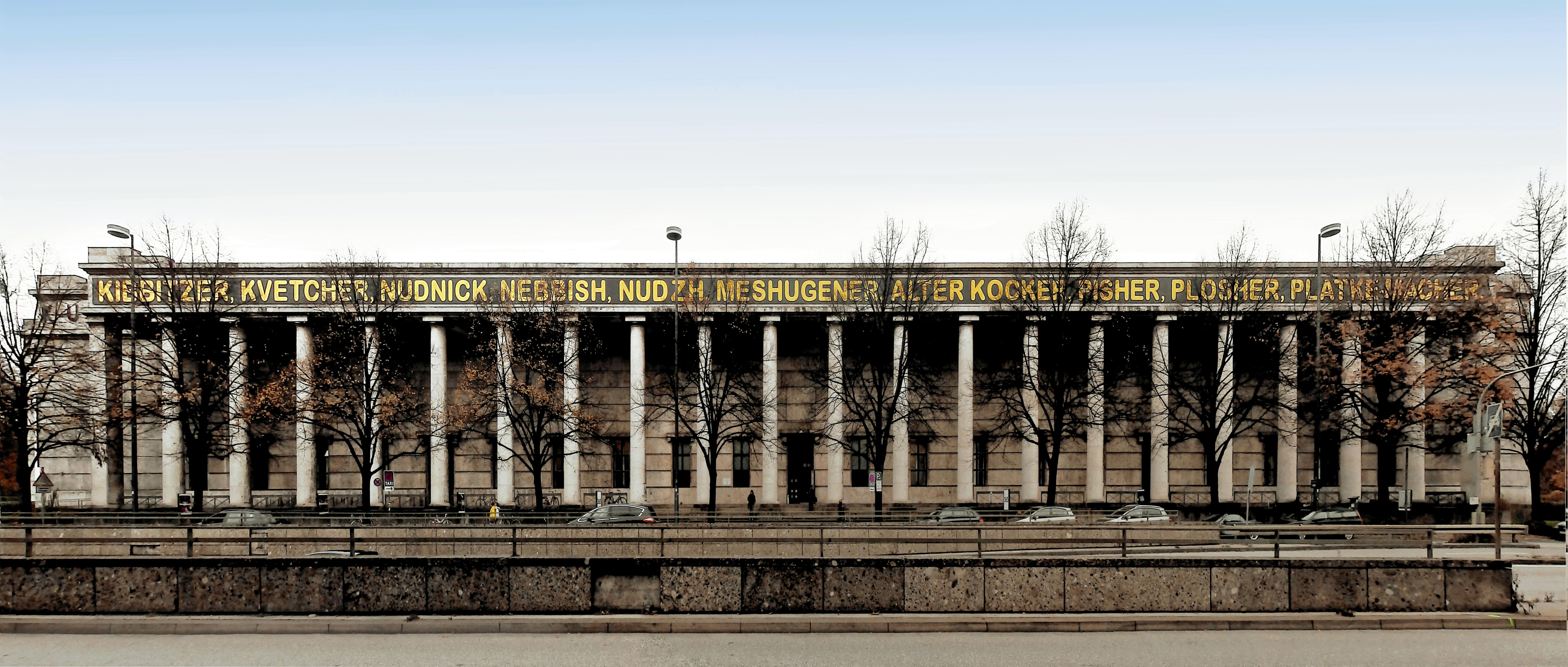 provisorische Version von File:Haus der Kunst (Munich).jpg